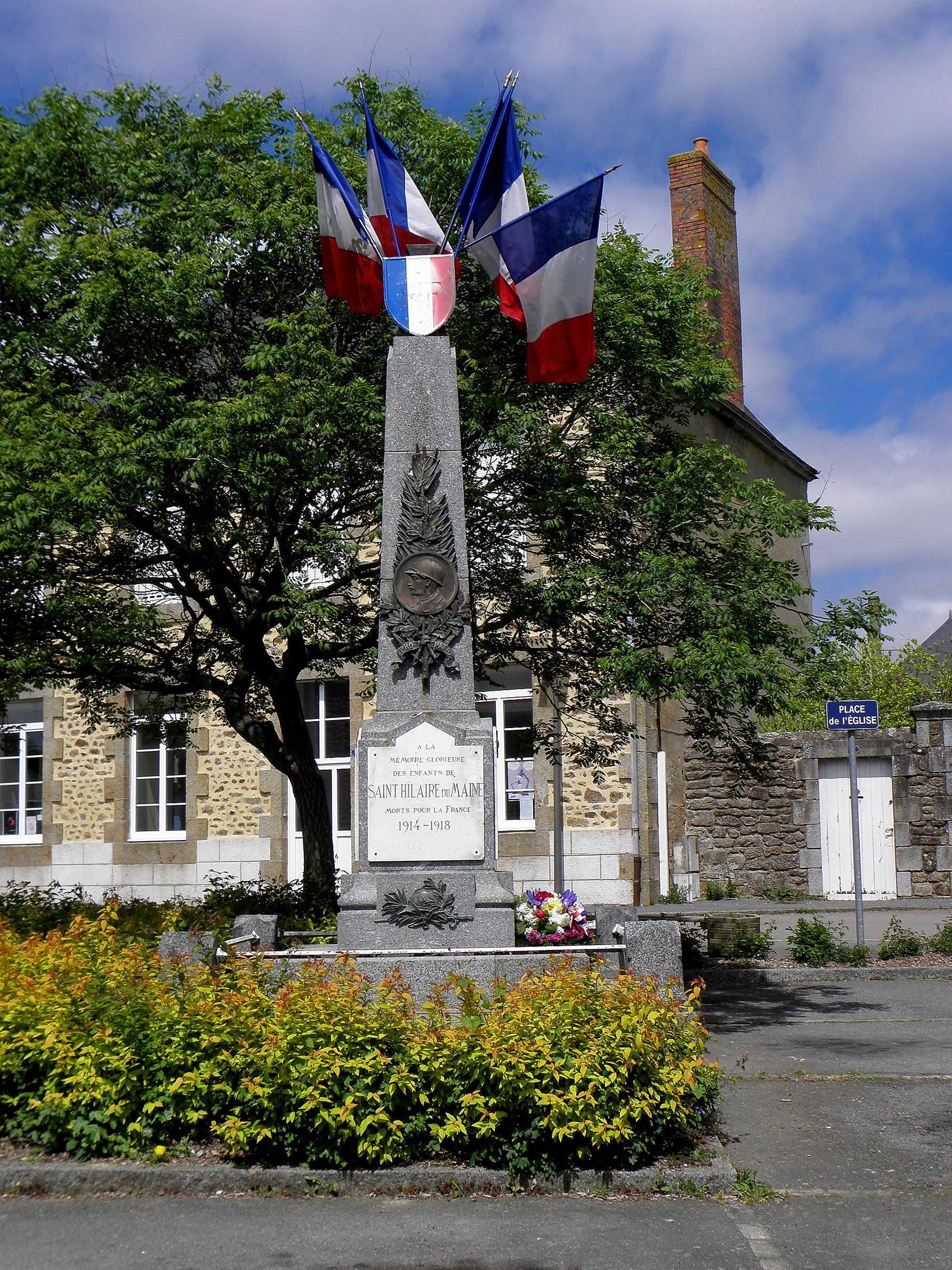 Monument aux morts de Saint-Hilaire-du-Maine (53).